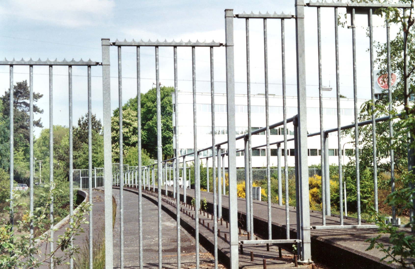 spoorviaduct over A28 bij Zeist